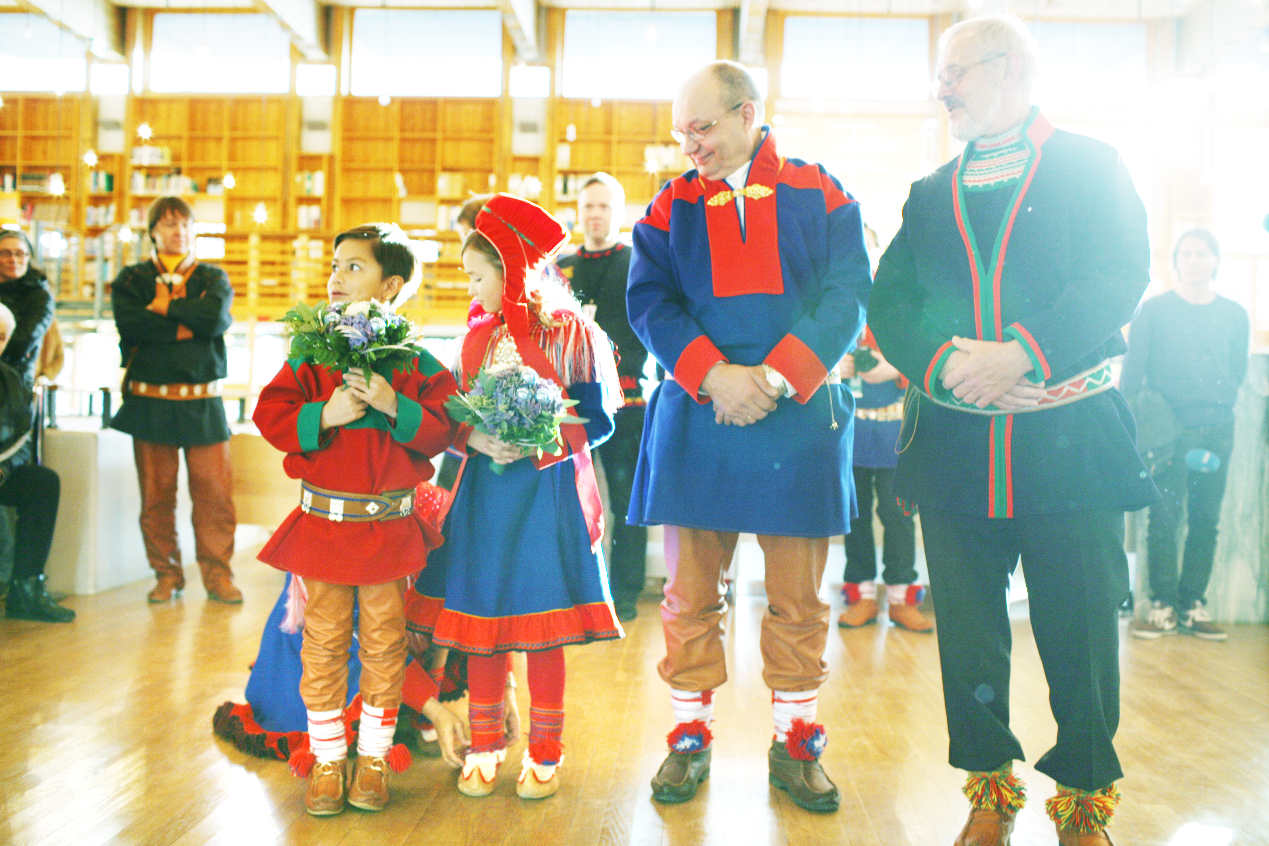 Blomsterbarna Jovnna Alex Sanatip Guttorm og Karine Johnsen venter sammen med avtroppende sametingspresident Egil Olli og avtroppende plenumsleder Jarle Jonassen (t.h.). Foto: Kenneth Hætta.